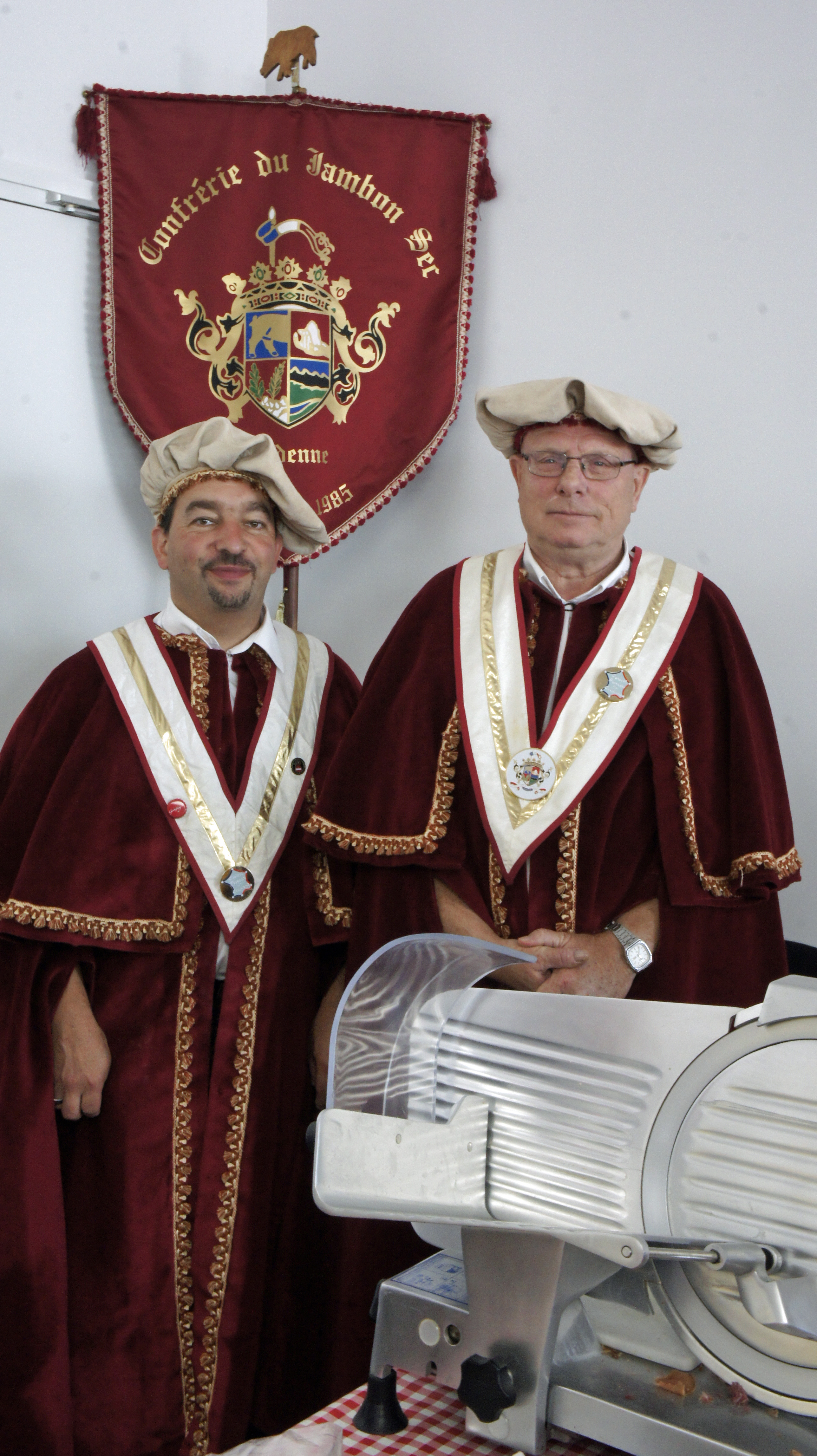 La Confrerie du jambon sec présente lors de la foire de Châlons de 2012.